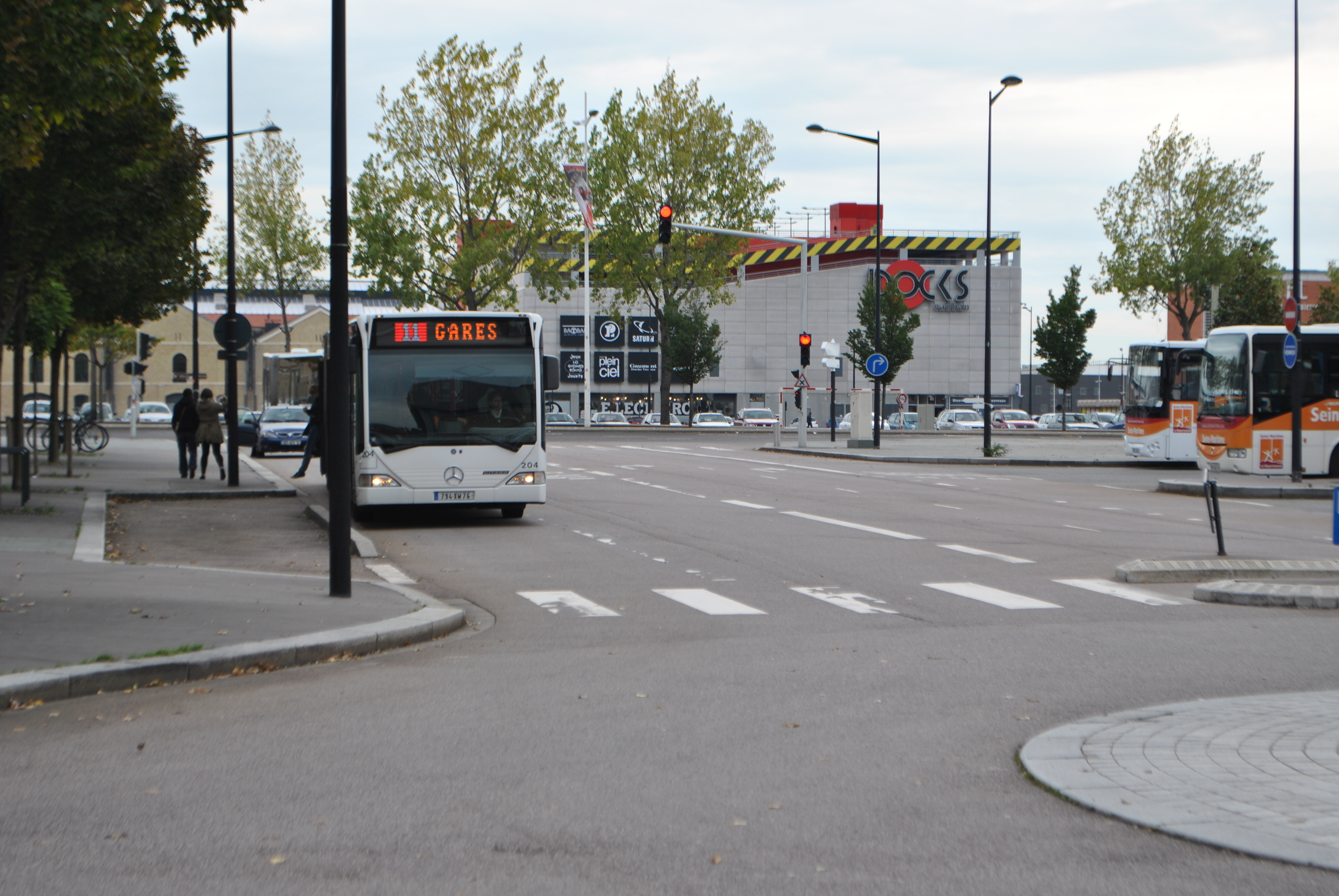 Bus stationnant en gare routière du Havre.